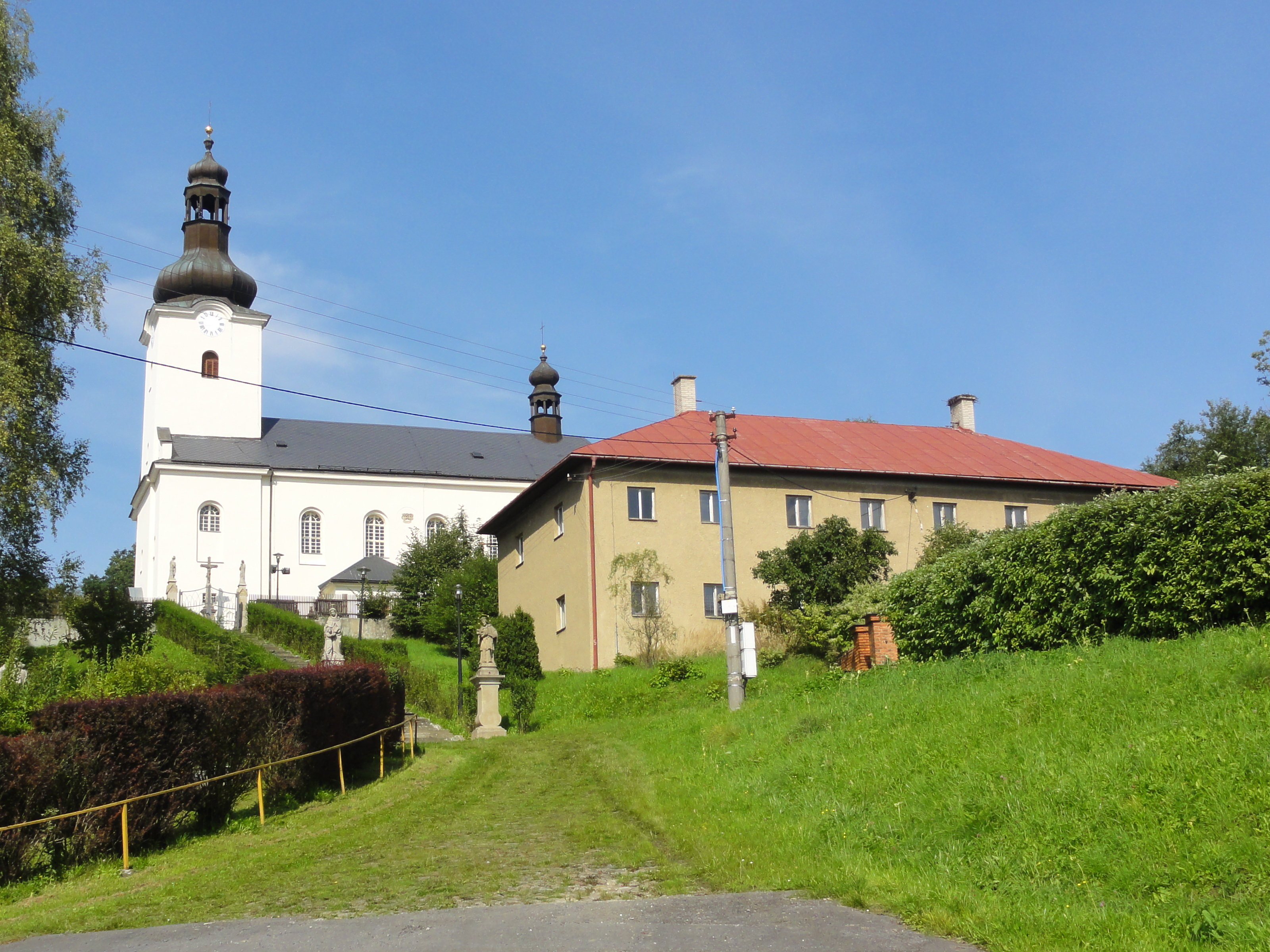 Bruzovice. Kostel svatého Stanislava